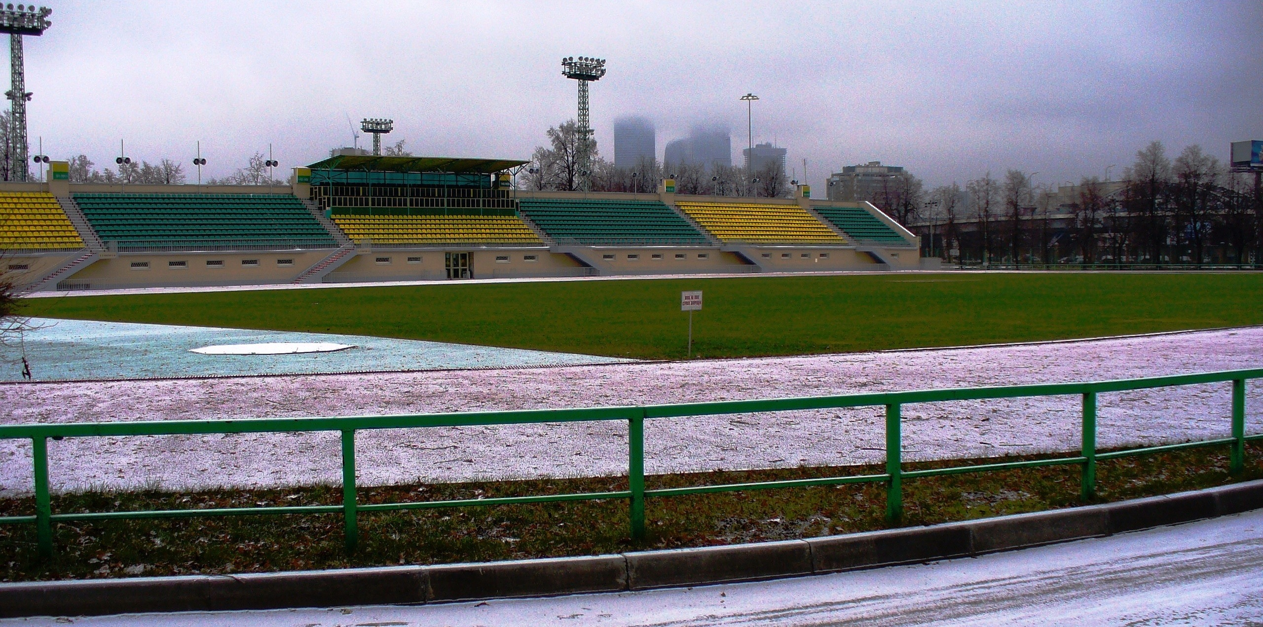 Спорткомплекс Лужники. Спортивный городок